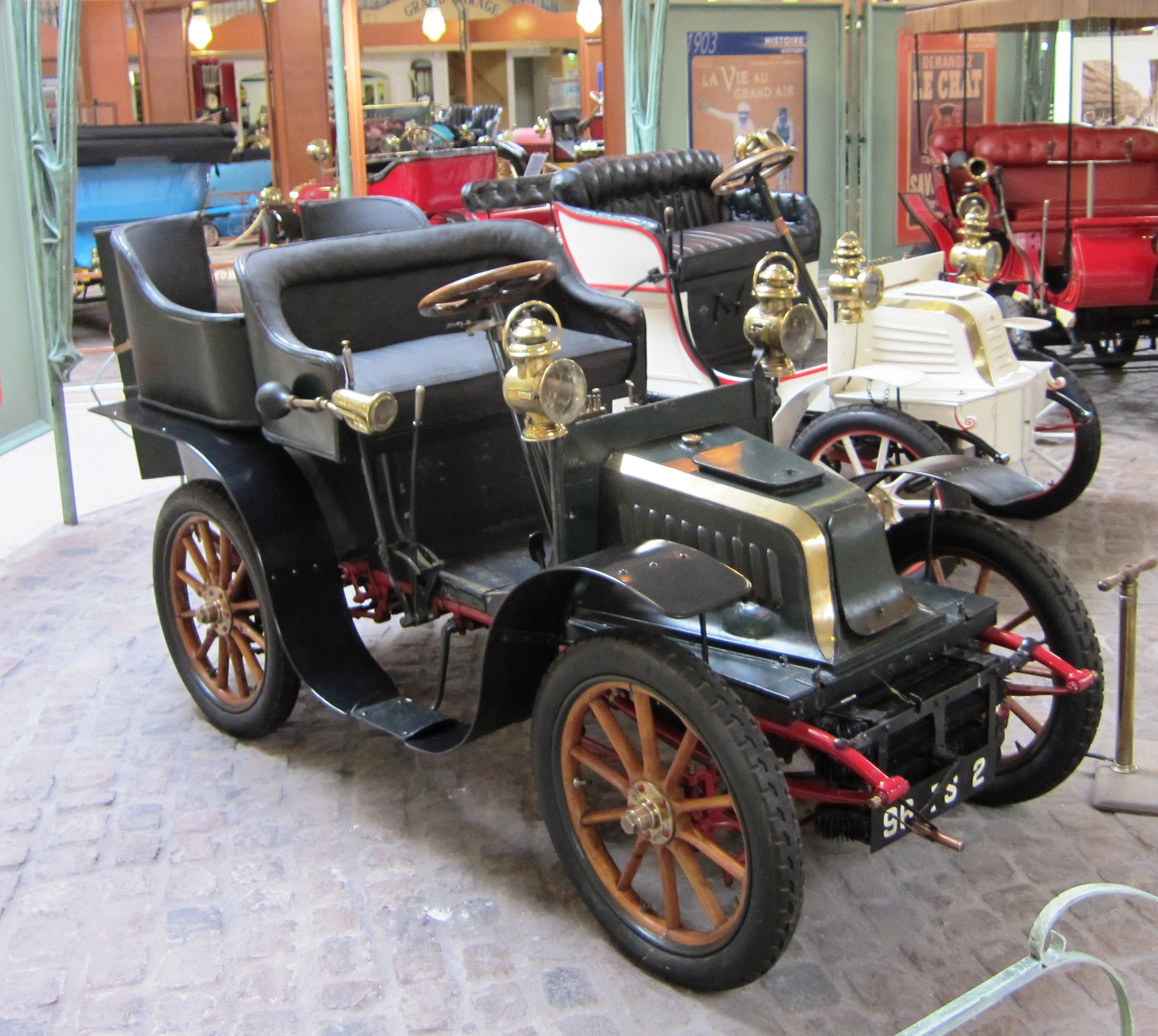 Peugeot Type 56 Tonneau